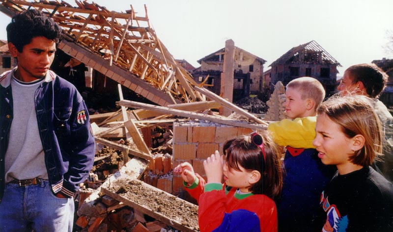 Нато бомбардовање СР Југославија 1999. године. Нато бомбе срушиле куће у Видовданском насељу